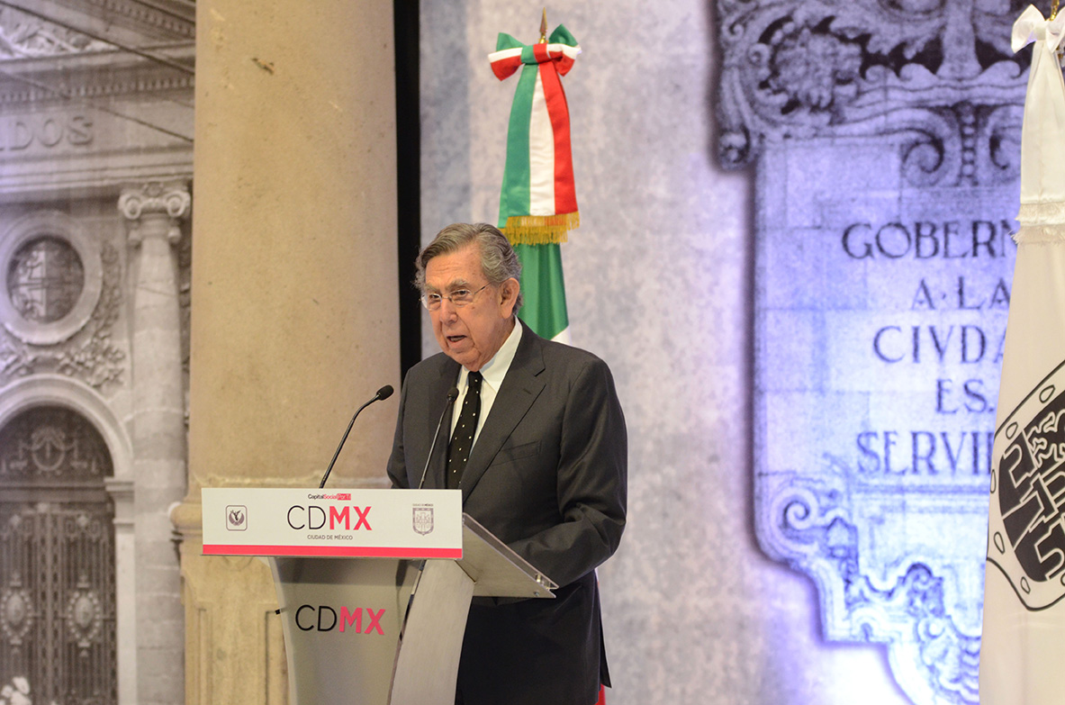 Cuauhtémoc Cárdenas, político mexicano.